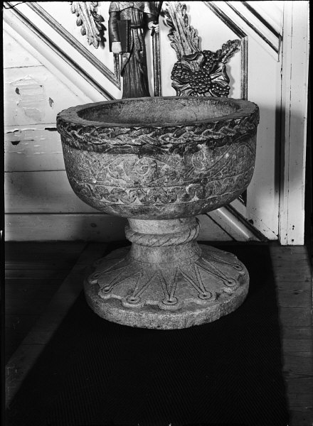 Dopfunt av täljsten. Snabbinv. Kategori: (04) Dopfuntar Dopfunt av täljsten. Snabbinv.